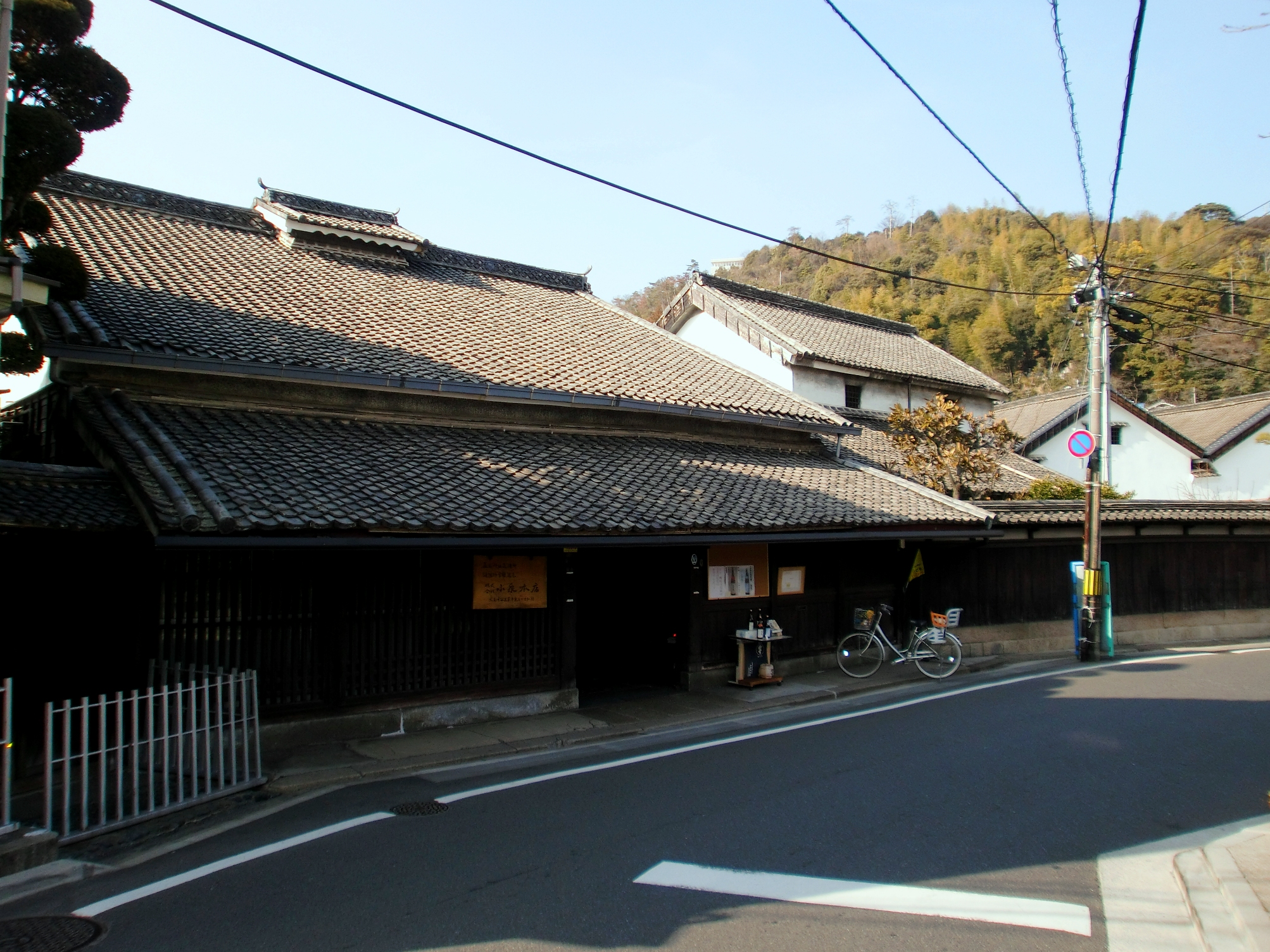 草津駅前